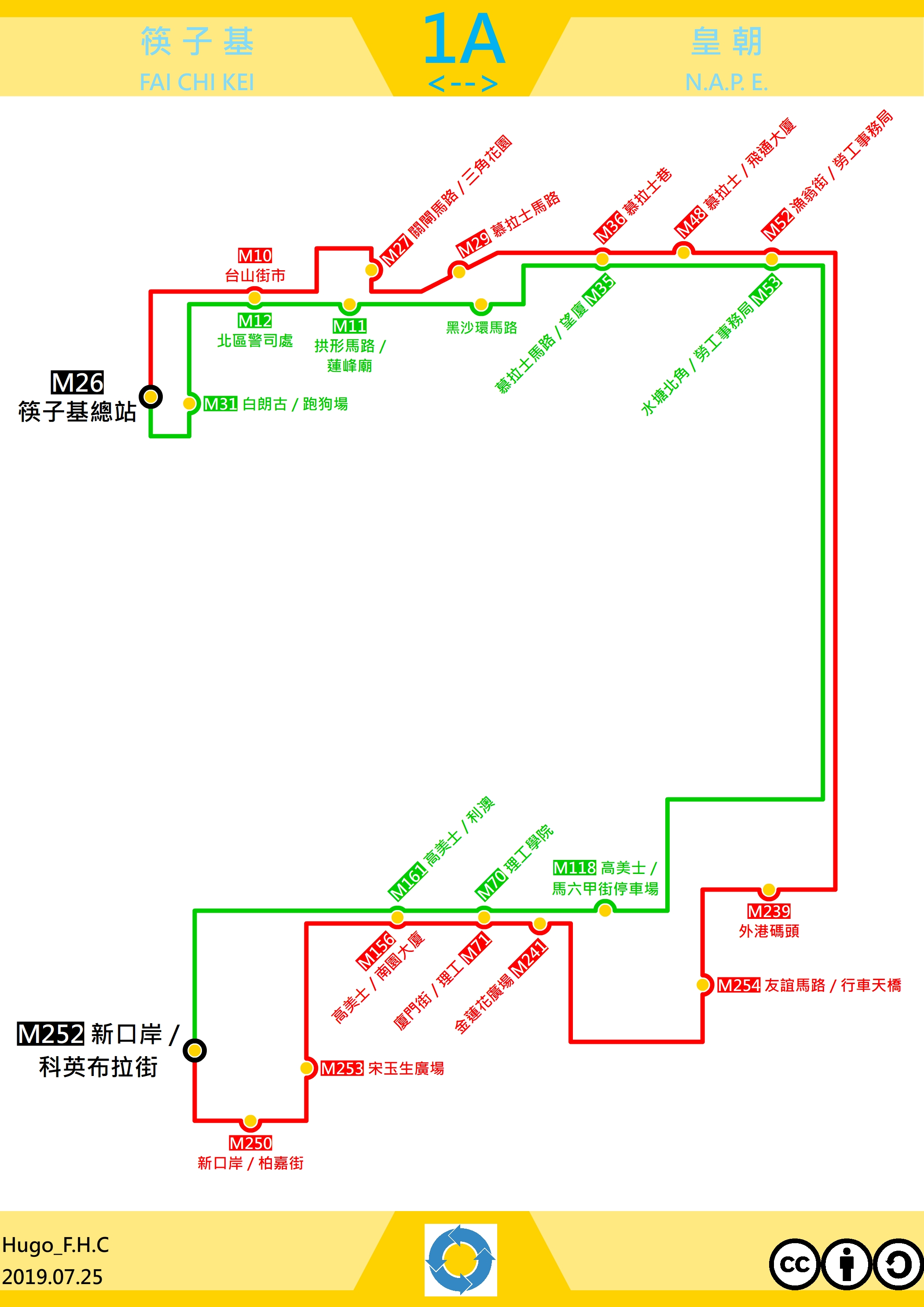 澳門巴士1A走線圖